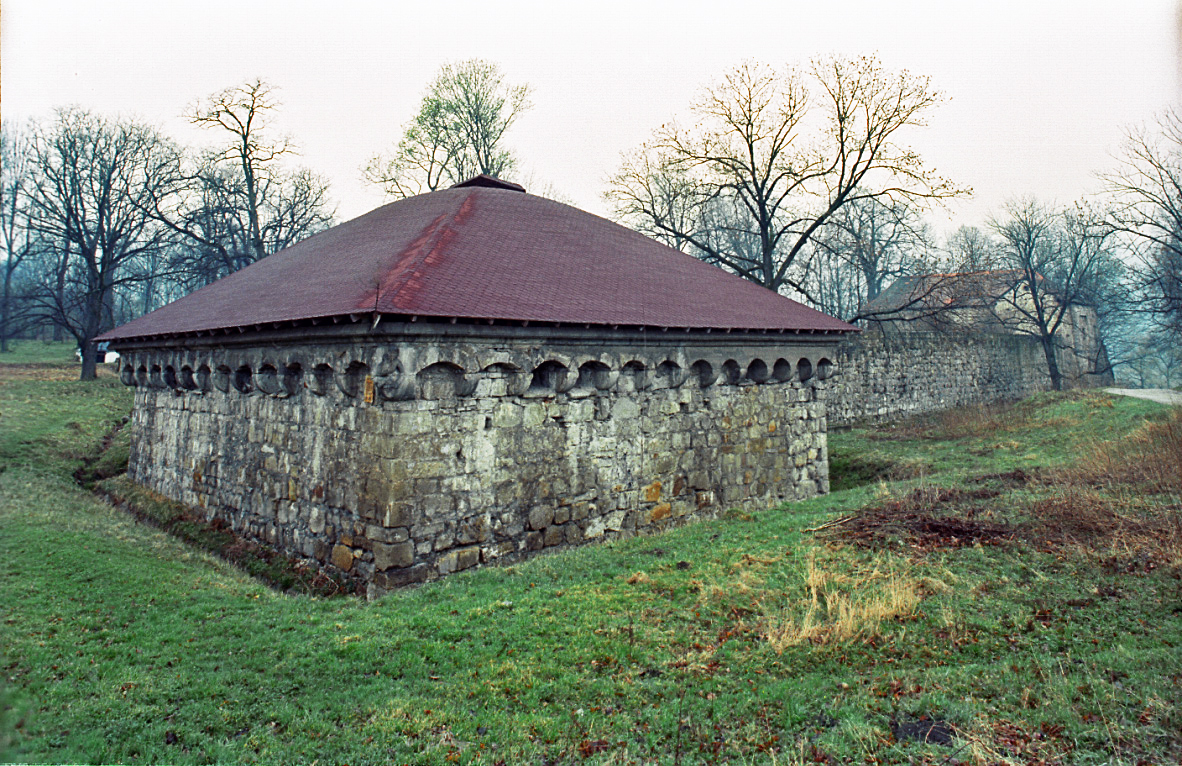 Rożnów